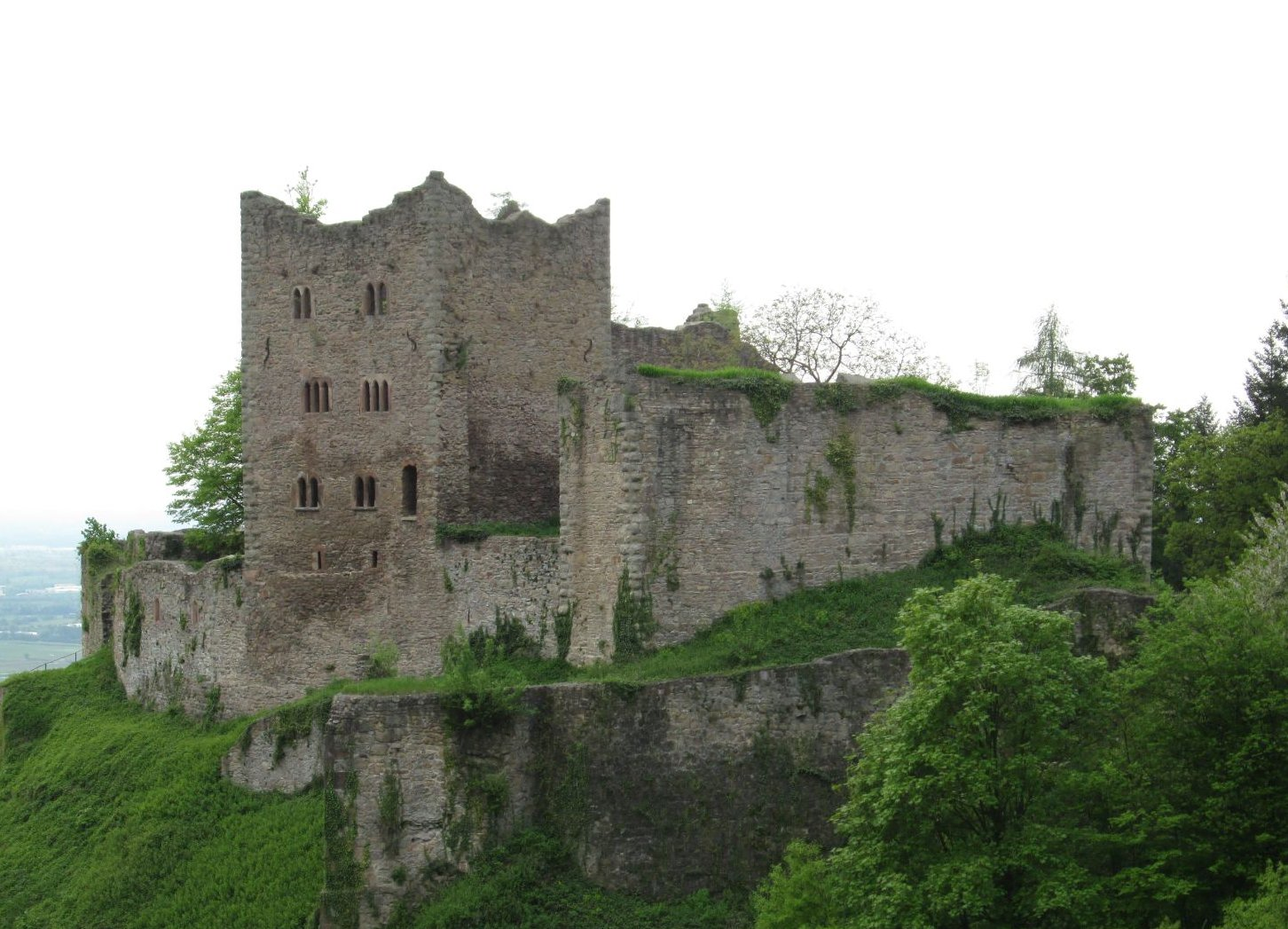 Schauenburg von Osten